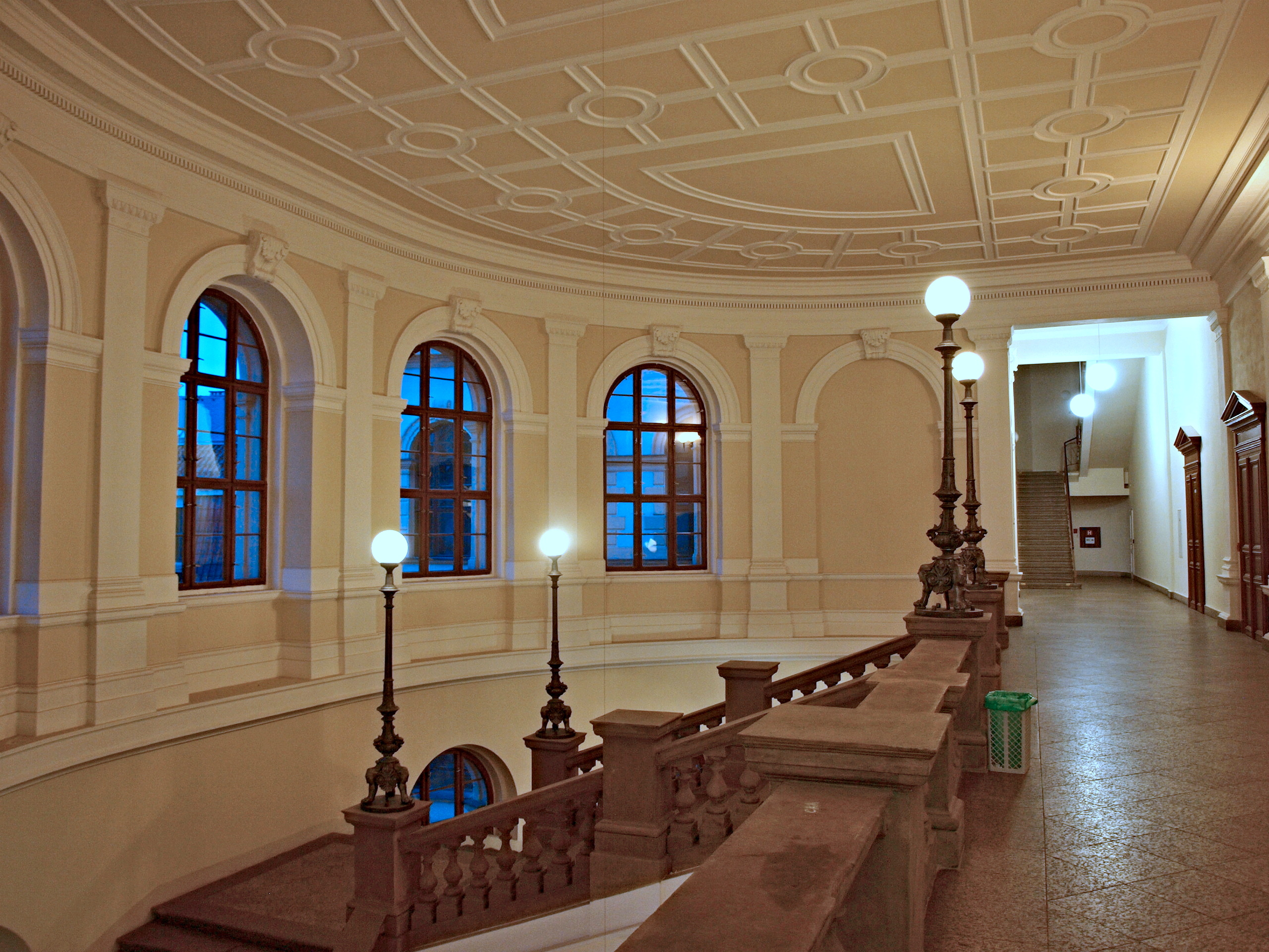 Karlovo náměstí, ČVUT